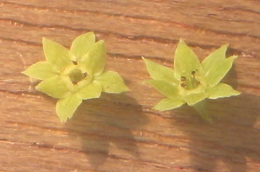 Alchemilla mollis (Fraaie vrouwenmantel bloemen)